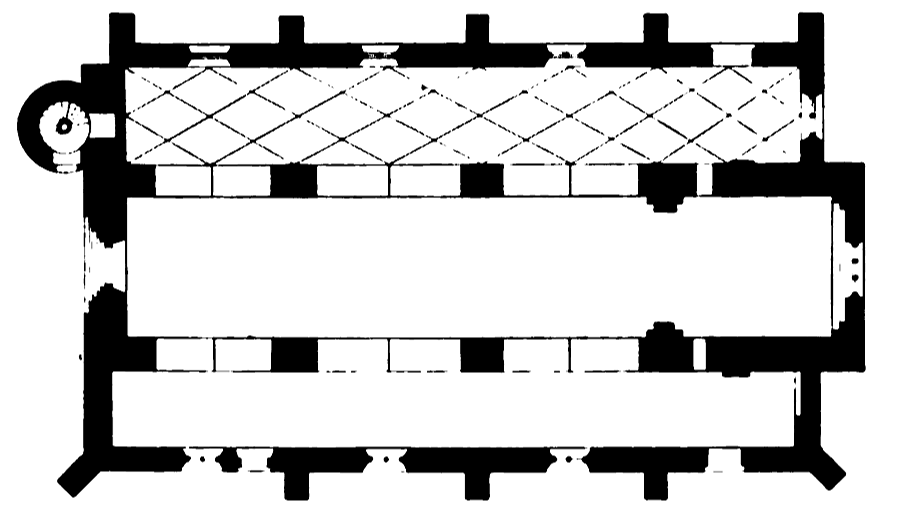 Martinikirche in Siegen/Westfalen: Grundrisszeichnung der Kirche. Grafik von Albert Ludorff